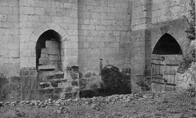 Détails Chapelle des Vierges à Sainte-Maure-de-Touraine